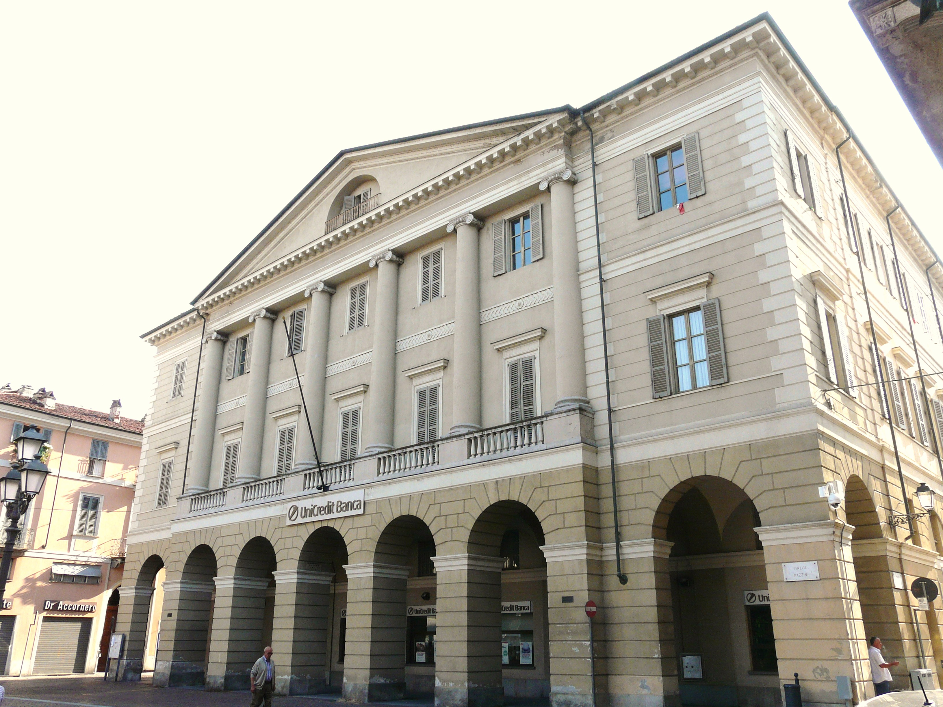 Palazzo del Credito Italiano, Casale Monferrato, Piemonte, Italia